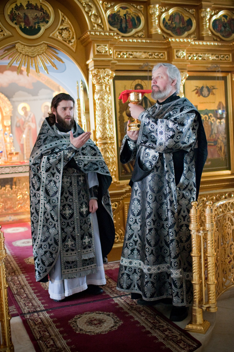 Литургия Преждеосвященных даров в Великий пост